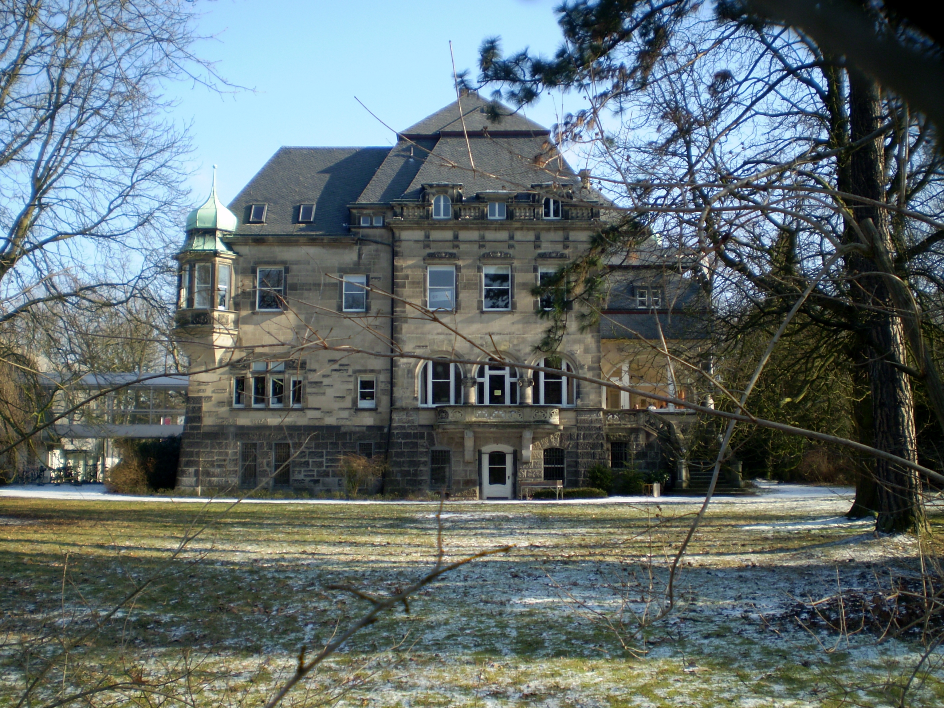 Rheinseite der ehemaligen Villa Mauser in Bad Honnef